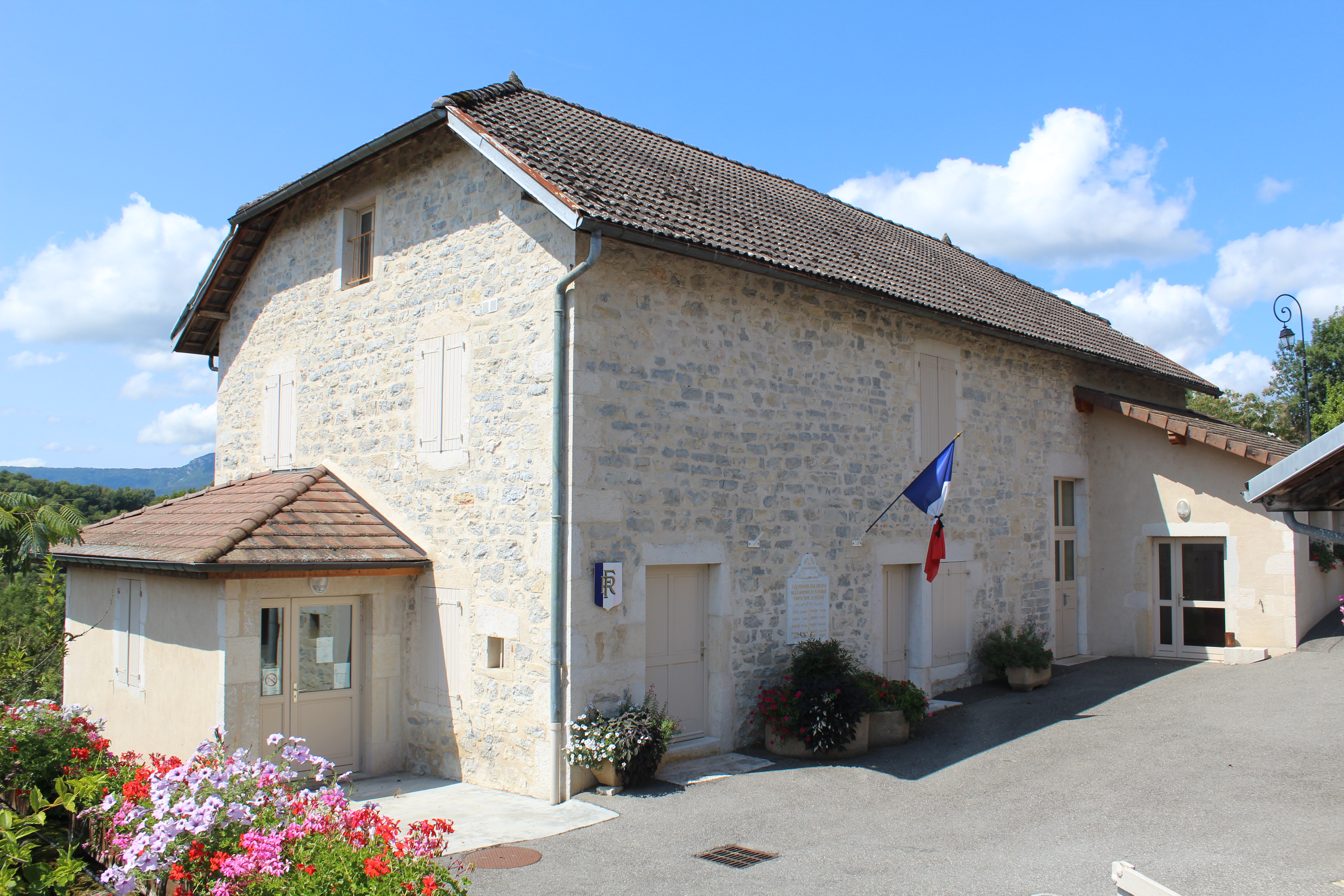 Mairie de Marignieu.